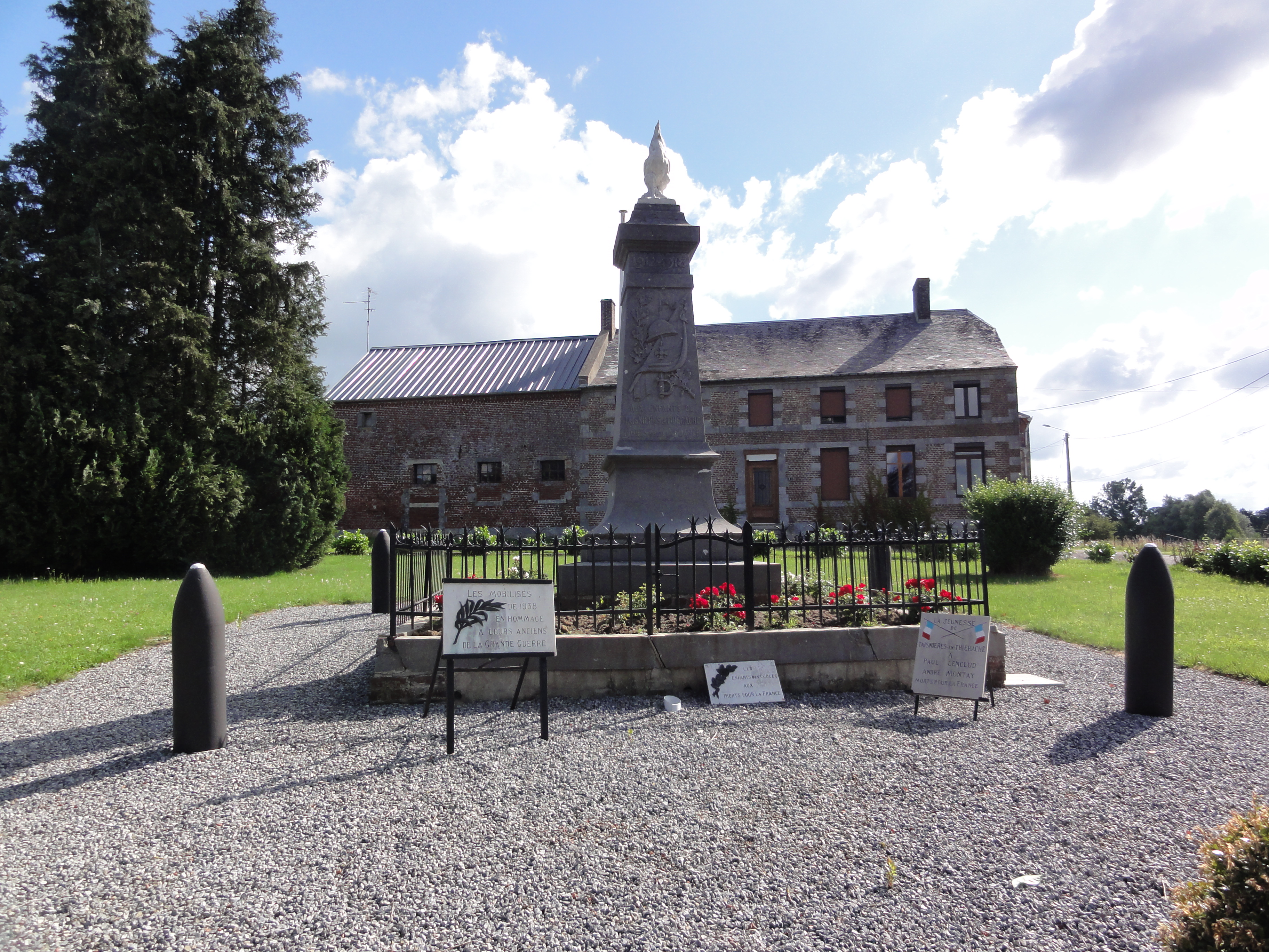 Taisnières-en-Thiérache (Nord, Fr) monument aux morts